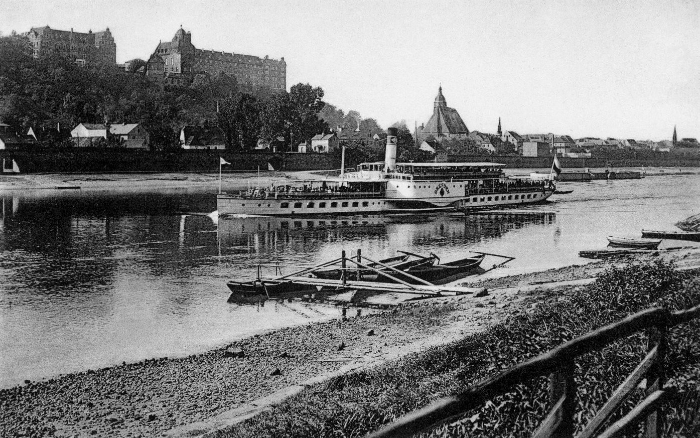 Pirna; Schloß Sonnenstein - Elbe mit Dampfer Dresden This postcard is from publisher Brück & Sohn in Meißen ( postcard has a unique number 23810 and is available in a higher resolution at the publisher. This images was uploaded in a cooperation project between Wikipedians and the publisher.